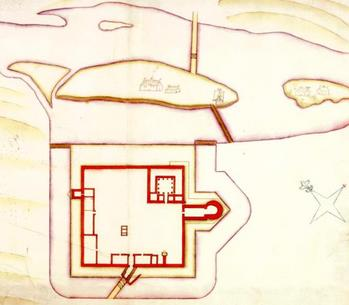 Põltsamaa ordulinnuse plaan